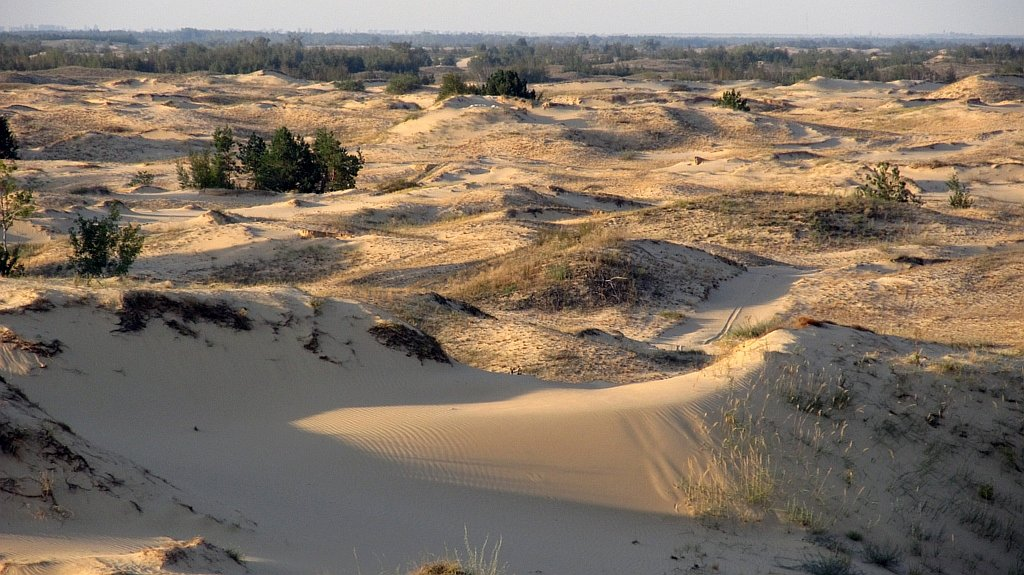 Херсонська область, Національний природний парк Олешківські піски. Автор Гаврилюк С. В. (3)